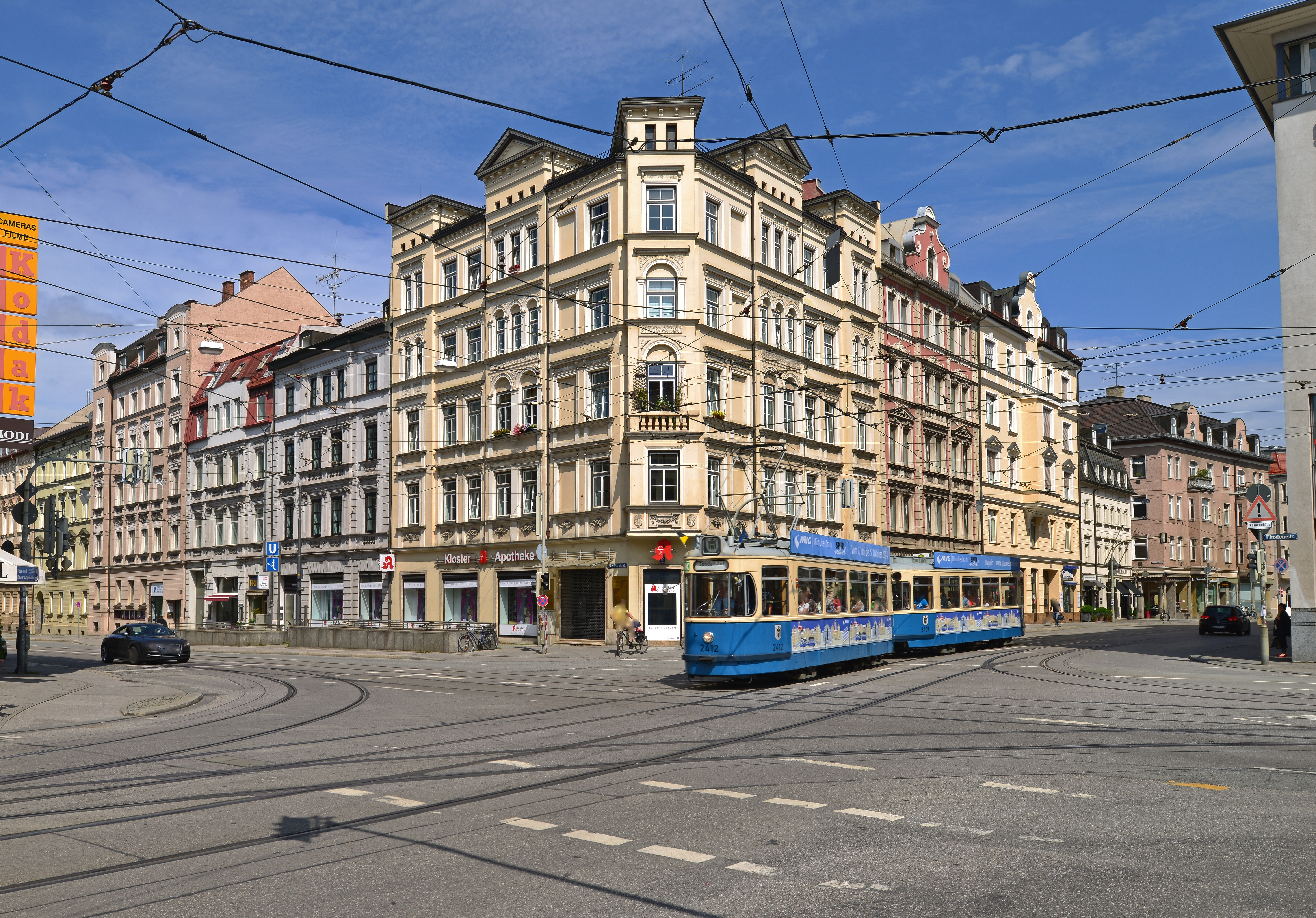 München. Der Trambahnknotenpunkt am Max-Weber-Platz. Mit den Straßen, Ismaninger-, Einstein-, Wiener-, und der Max-Planck-Straße. M-4 Wagenzug 2412 auf seiner Altstadtrundfahrt im Jahr 2014.